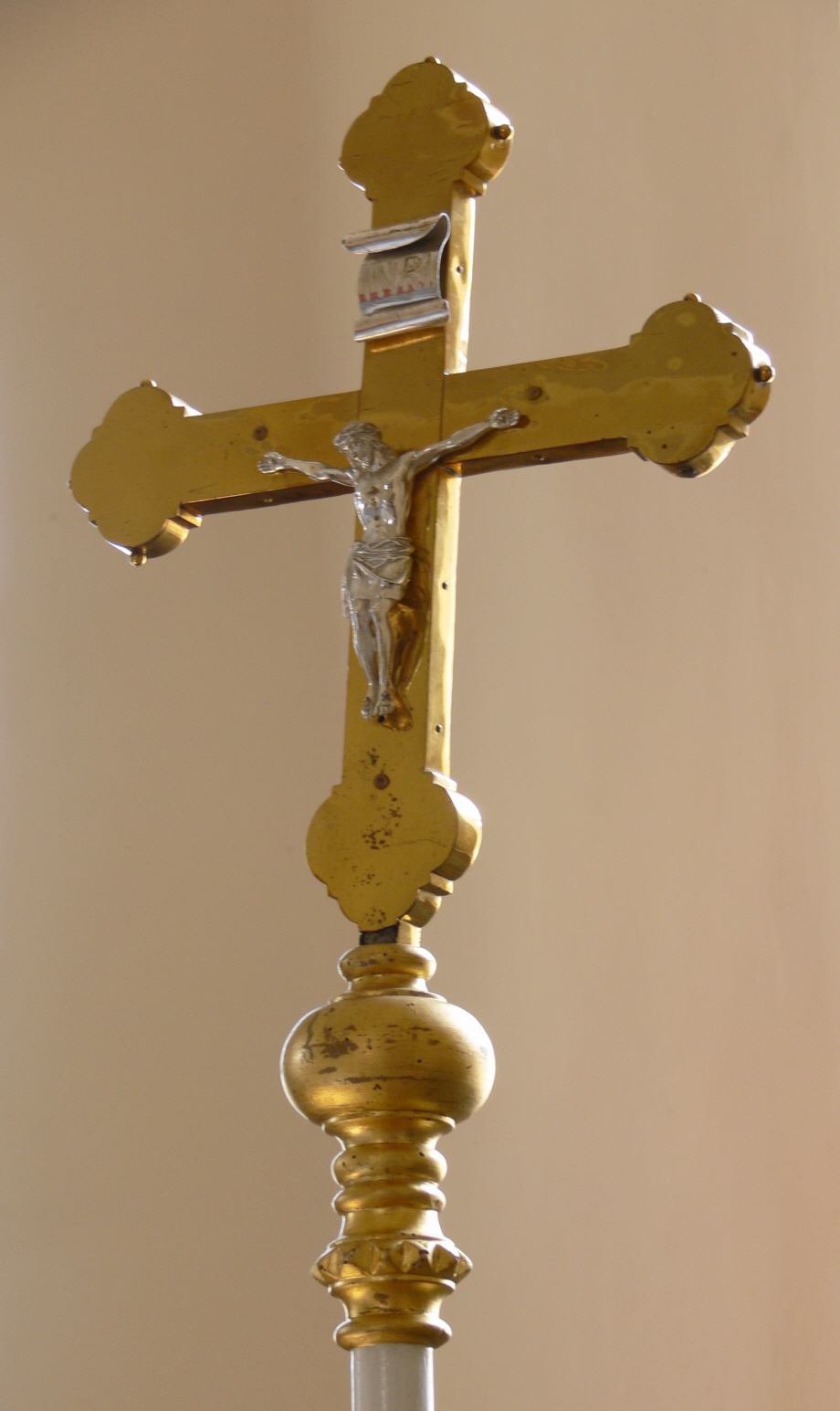 Katholische Pfarrkirche St. Stephanus, Ringgenweiler, Gemeinde Horgenzell, Landkreis Ravensburg Tragekreuz